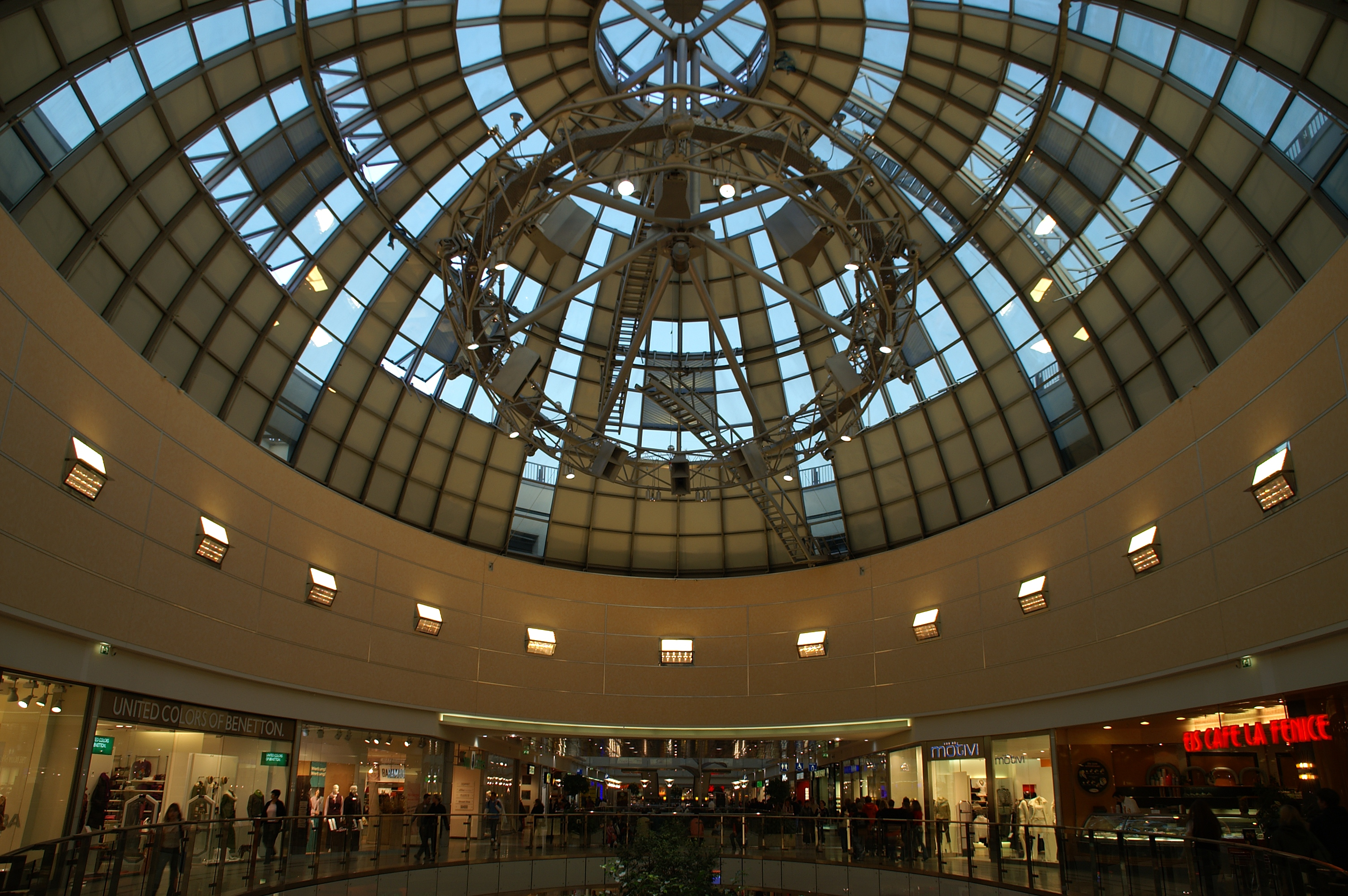 Einkaufsmall in Augsburg: Citygalerie